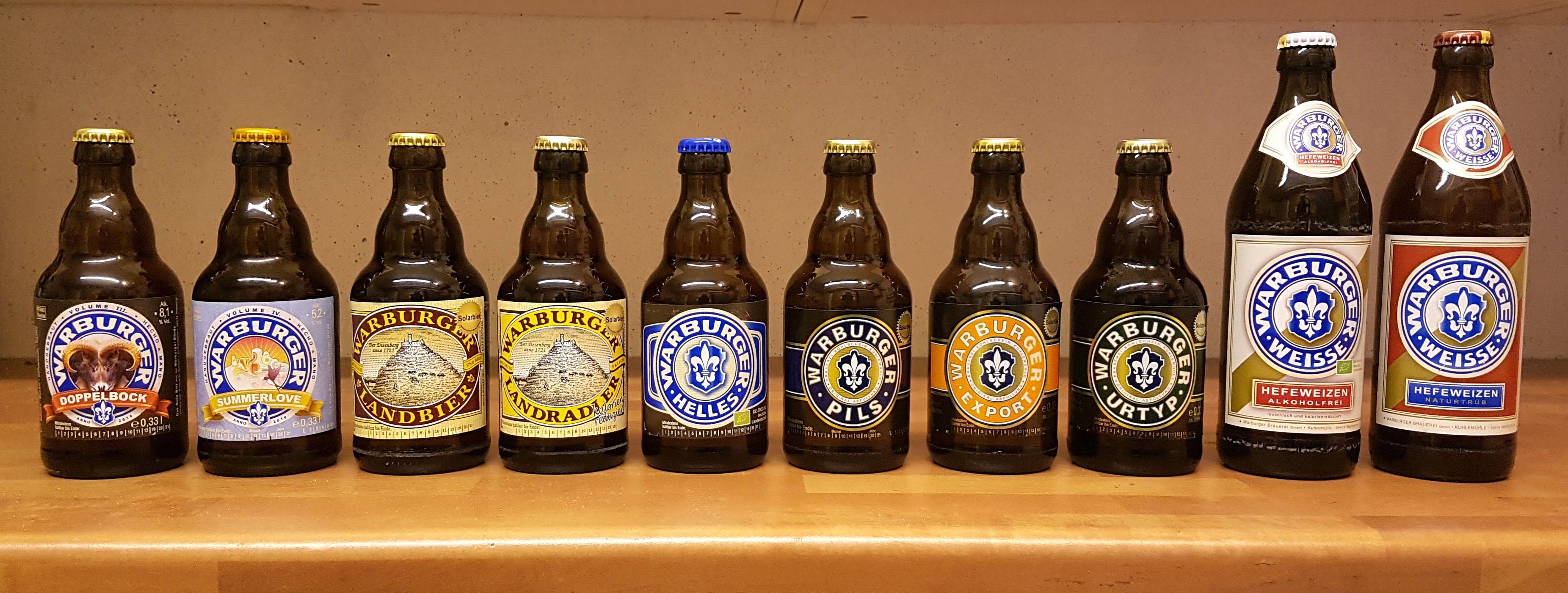 Warburger Bierspezialitäten